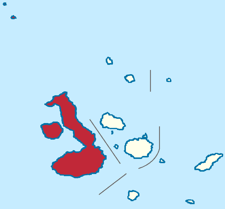 Mapa localizacor del cantón en Galápagos, Ecuador